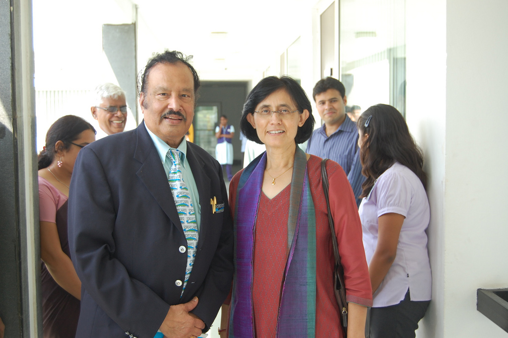 Vinita Bali and Dr Bala